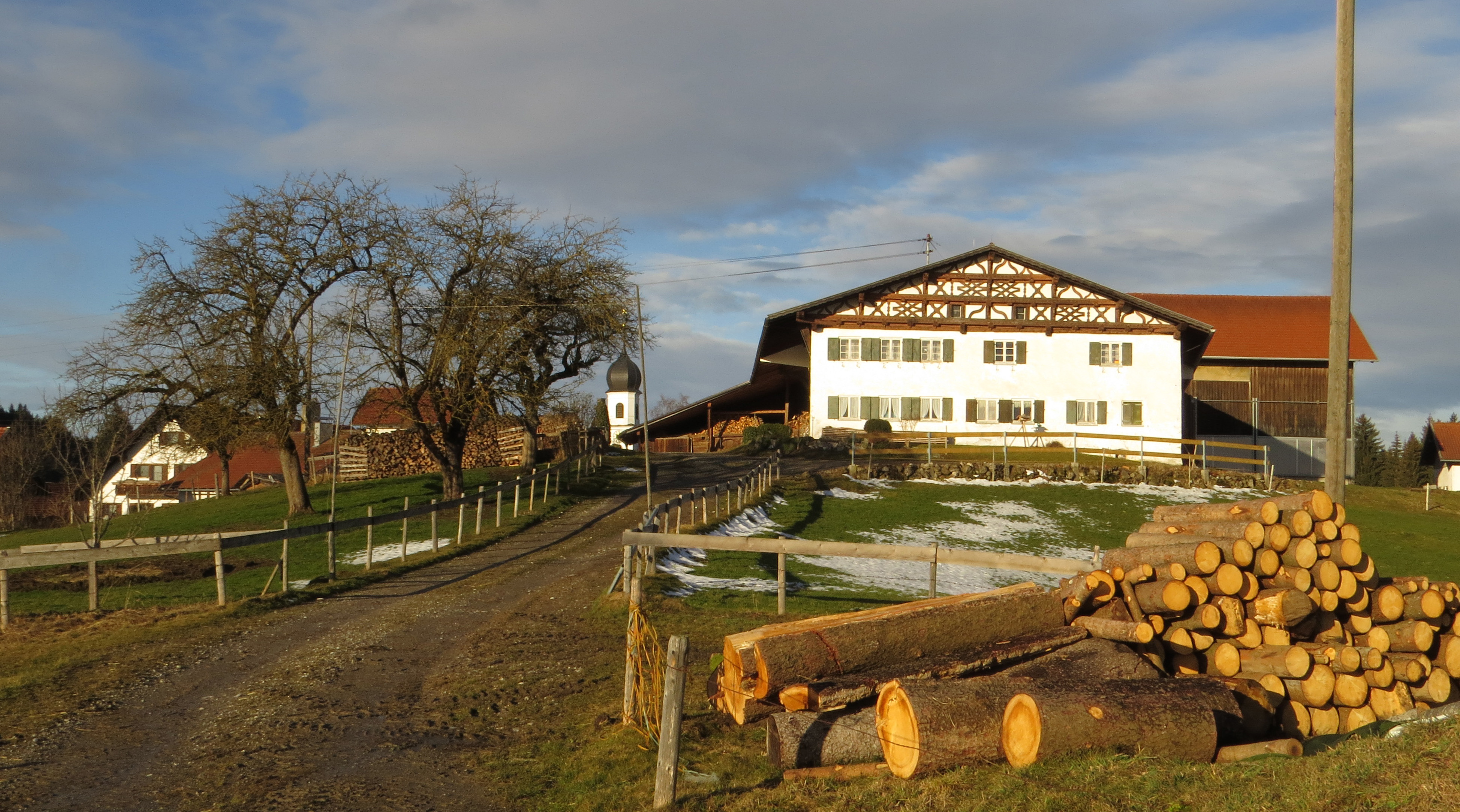 Stadels 1, Görisried